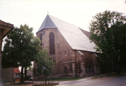 Aussenansicht des Chores der Stadtkirche St. Peter & Paul in Weißensee/Thüringen.